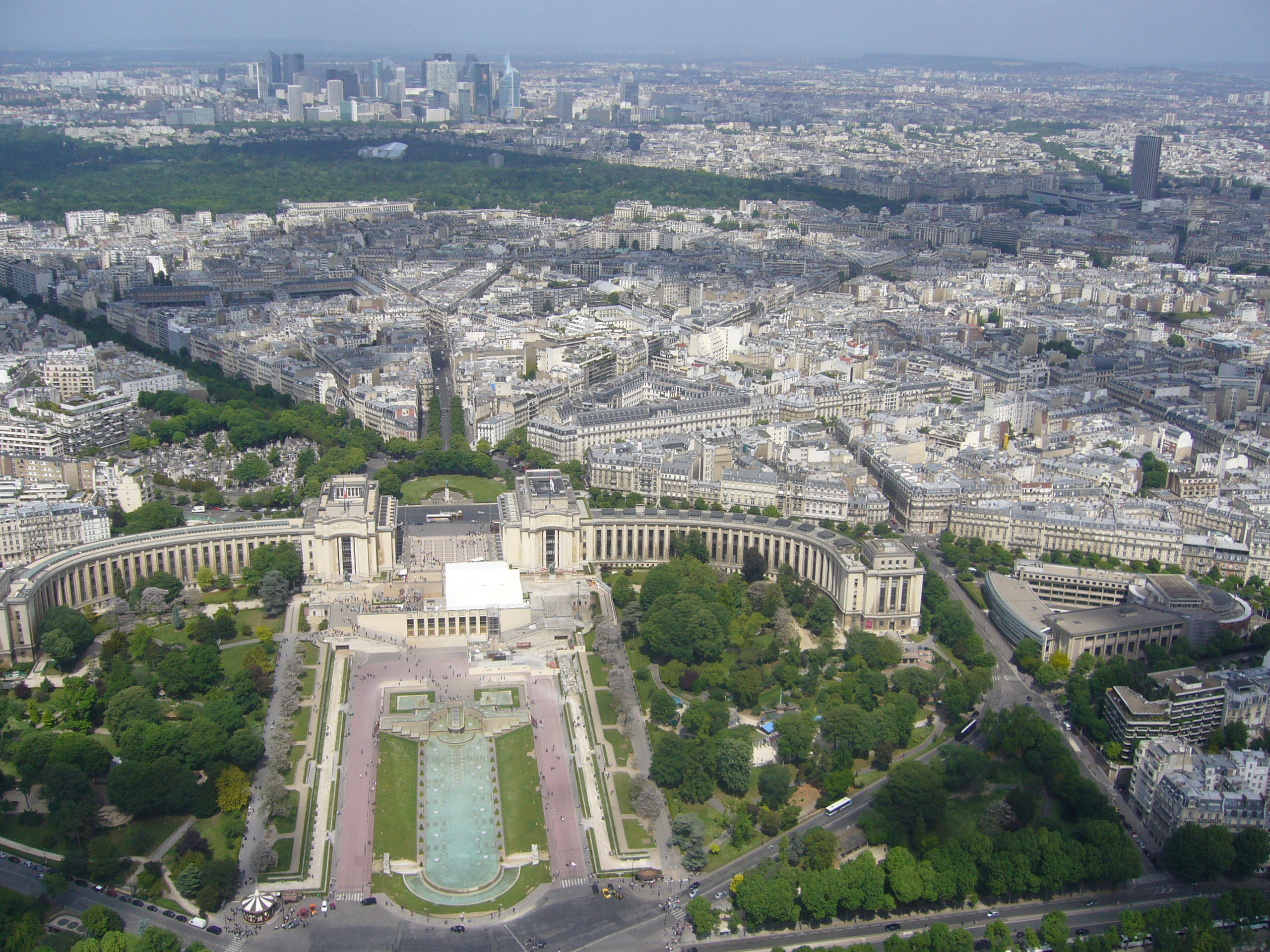 Vue du troisième étage de la Tour Effeil